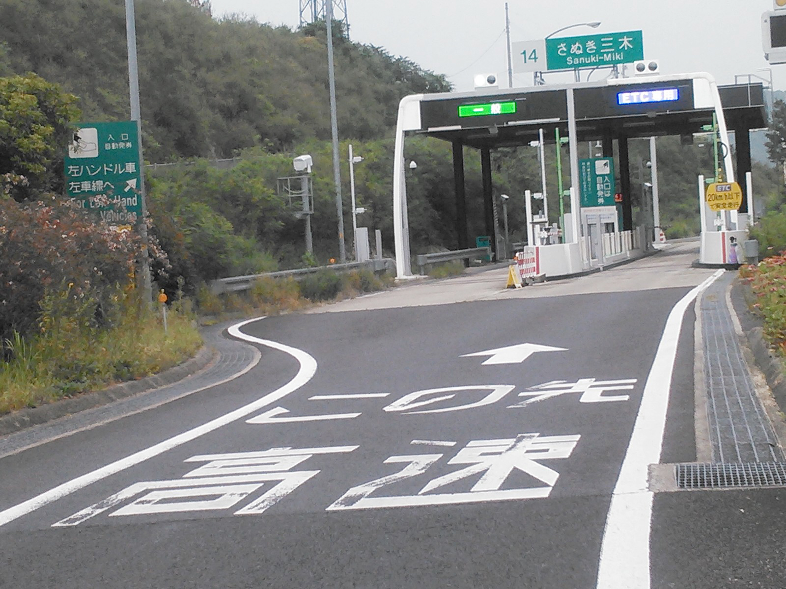 さぬき三木インターチェンジ入口。撮影者自身による撮影。